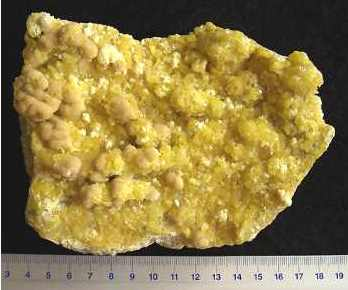 minerał; siarka, pochodzenie Polska, Machów; autor zdjęcia Ewa Jastrzębska 15.06.2006r.